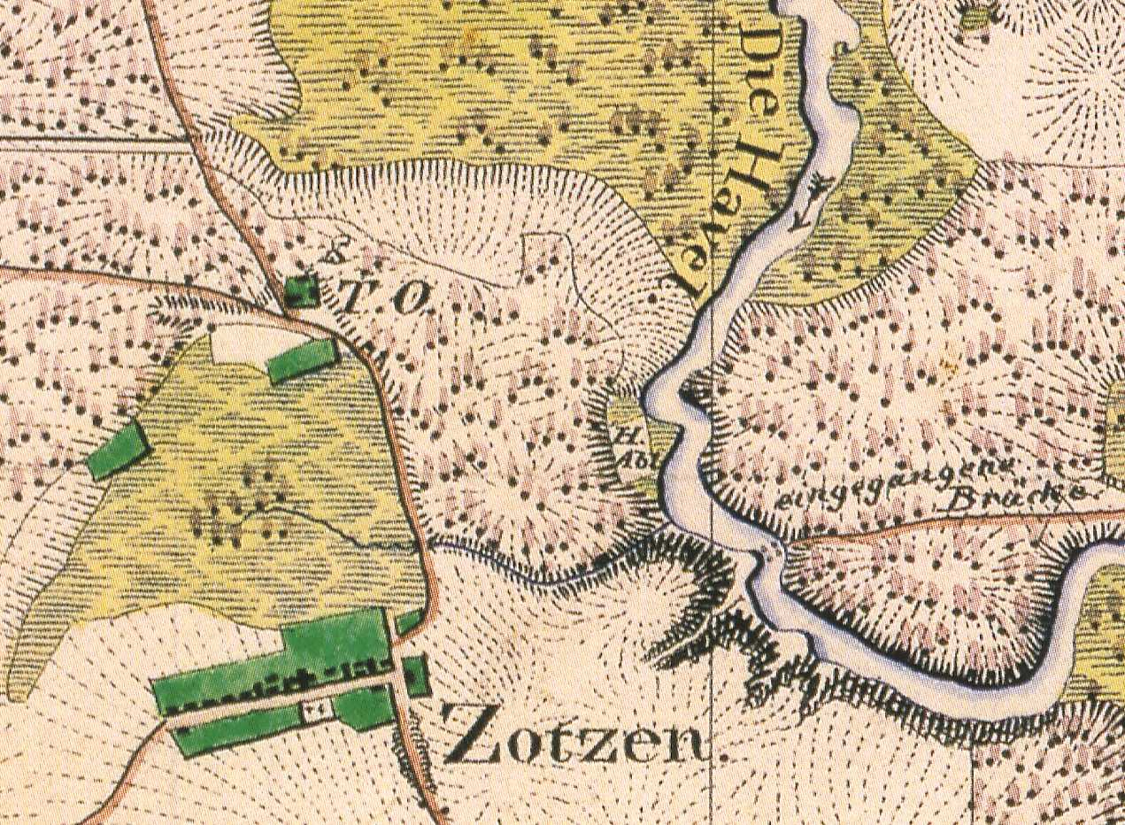 Zootzen, OT von Fürstenberg/Havel, Lkr. Oberhavel, Brandenburg, Ausschnitt aus dem Urmesstischblatt Blatt 2845 Bredereiche von 1825